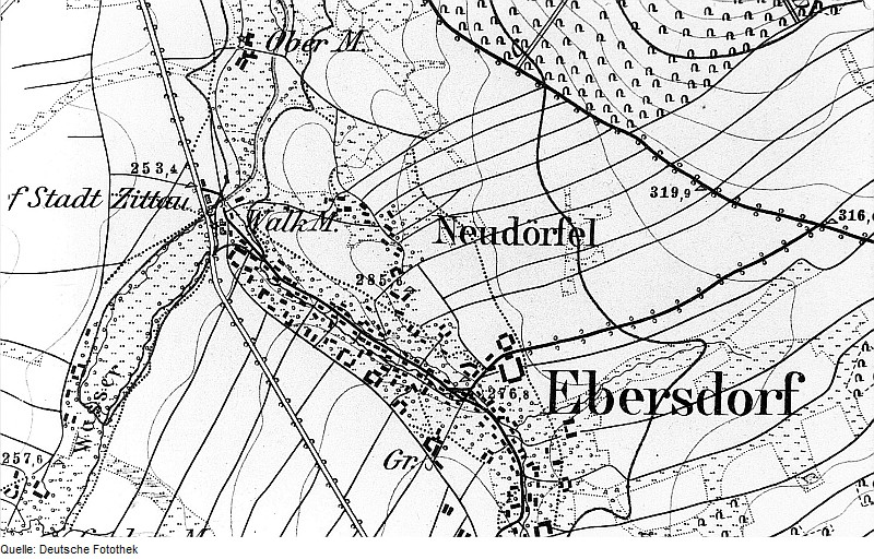 Original image description from the Deutsche Fotothek Löbau-Ebersdorf. Meßtischblatt, Sekt. Löbau, 1884